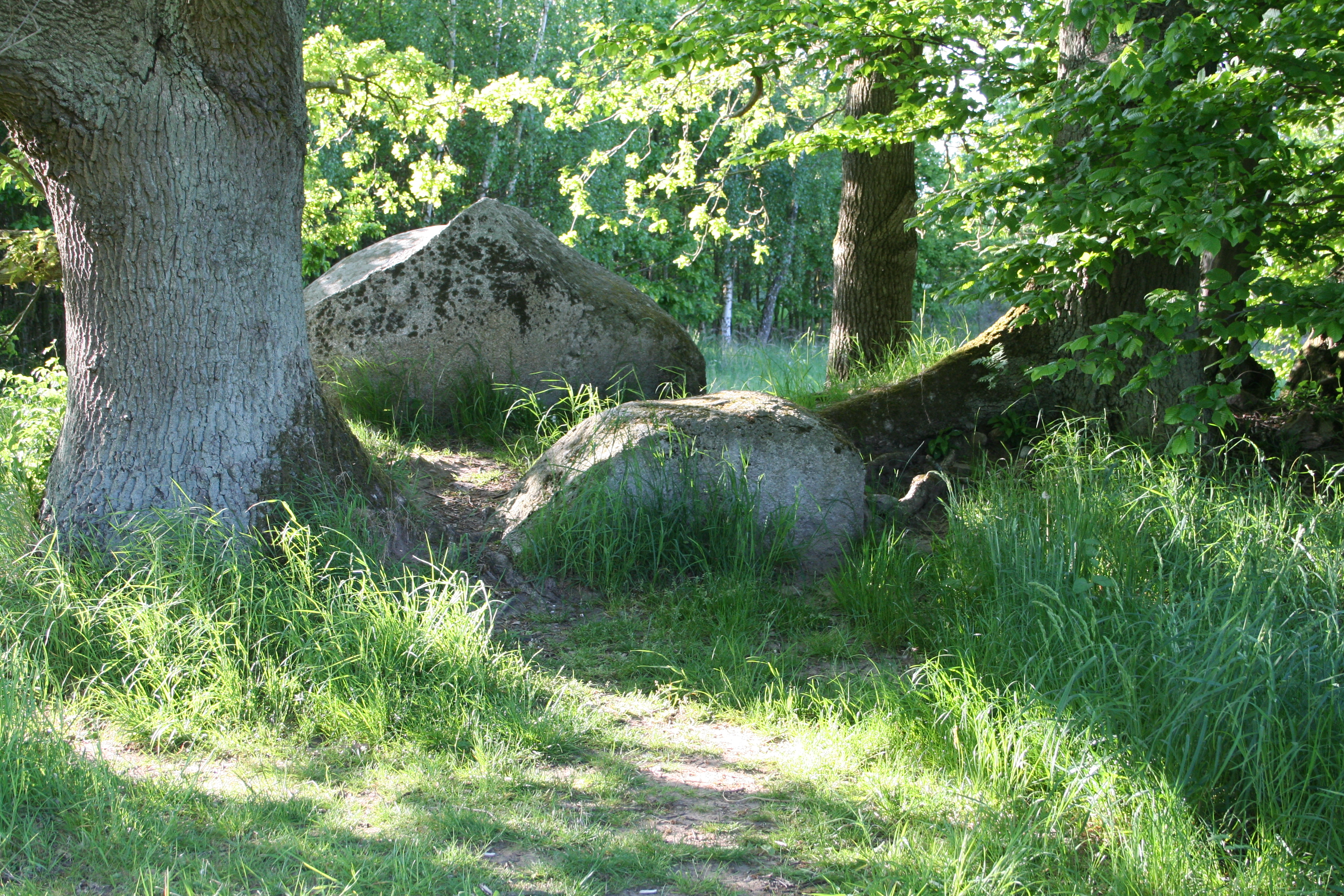 Großsteingrab Burtevitz 4 (Sprockhoff-Nr. 505)